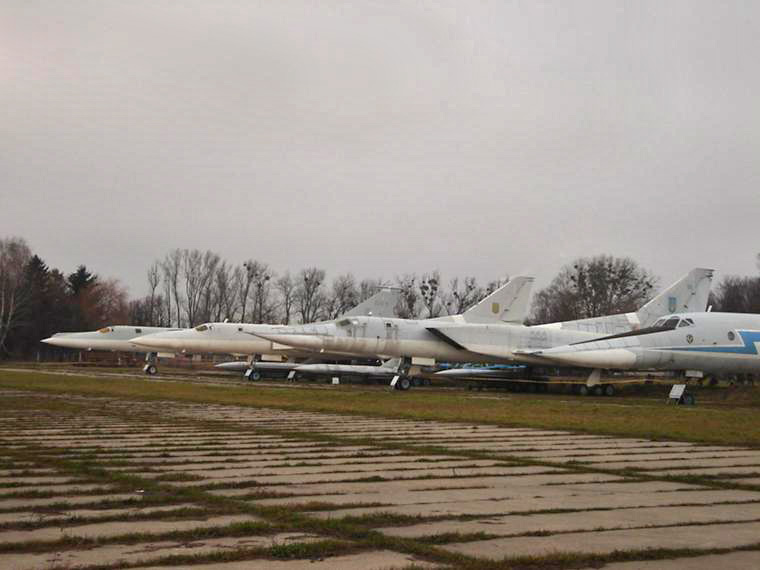 Слева-направо: Ту-22М0, Ту-22М2, Ту-22М3 и Ту-134УБЛ ВВС Украины в Государственном музее авиации Украины.